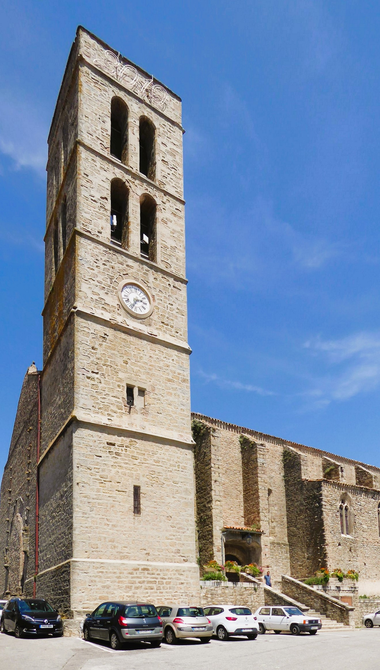 Église Saint-Étienne de Trèbes